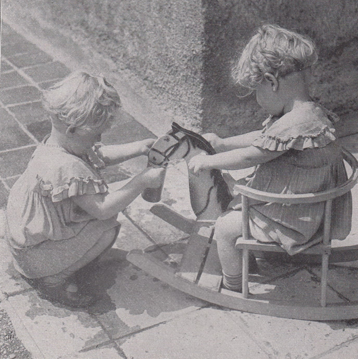 Vertieft im Spiel: Füttern des hungrigen Pferdes